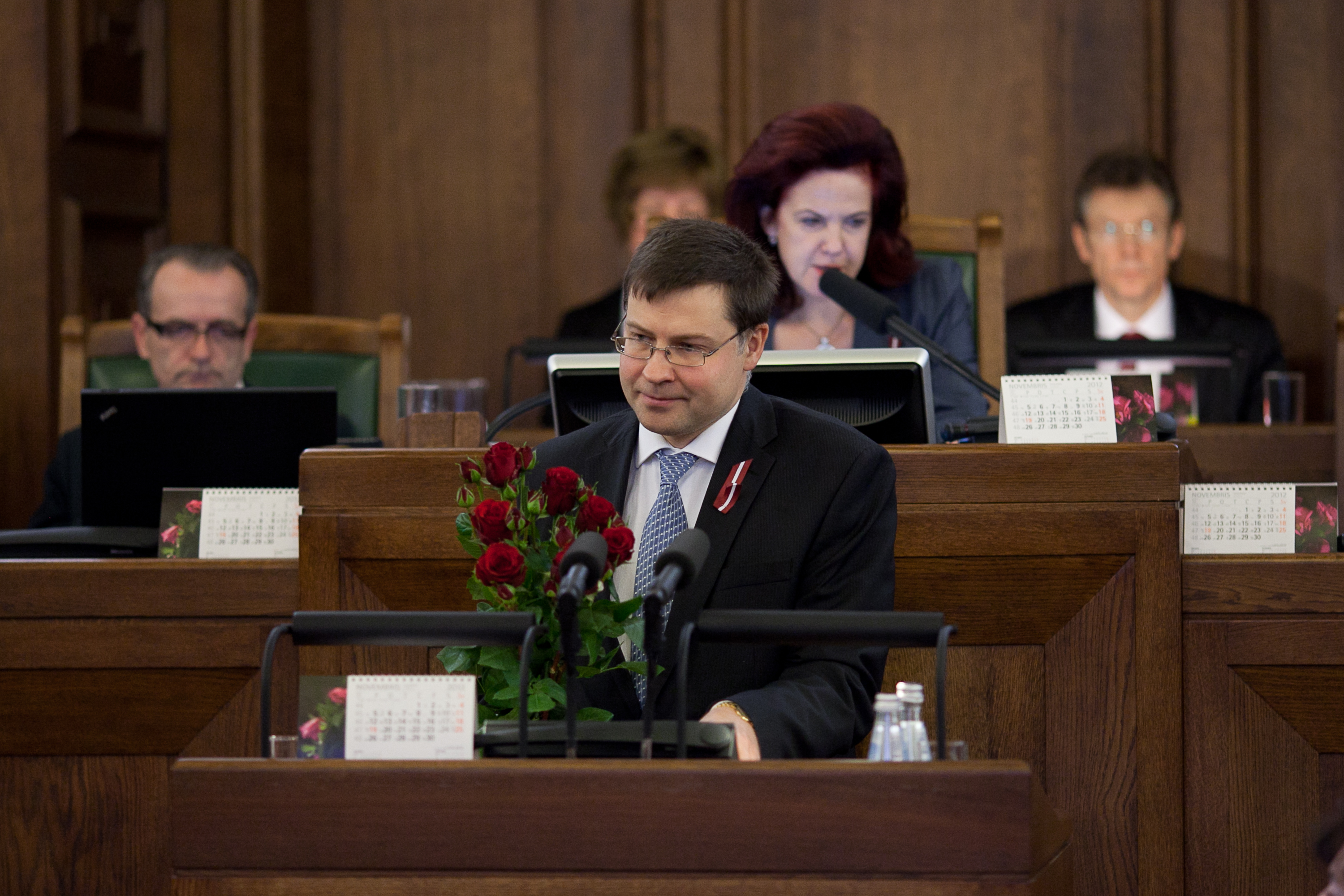 2012.gada 15.novembris. Saeima pieņem Vidēja termiņa budžeta ietvaru 2013., 2014. un 2015.gadam, 2013.gada valsts budžeta likumu un grozījumus 25 likumos, kas saistīti ar budžetu Foto: Ernests Dinka, Saeimas Kanceleja